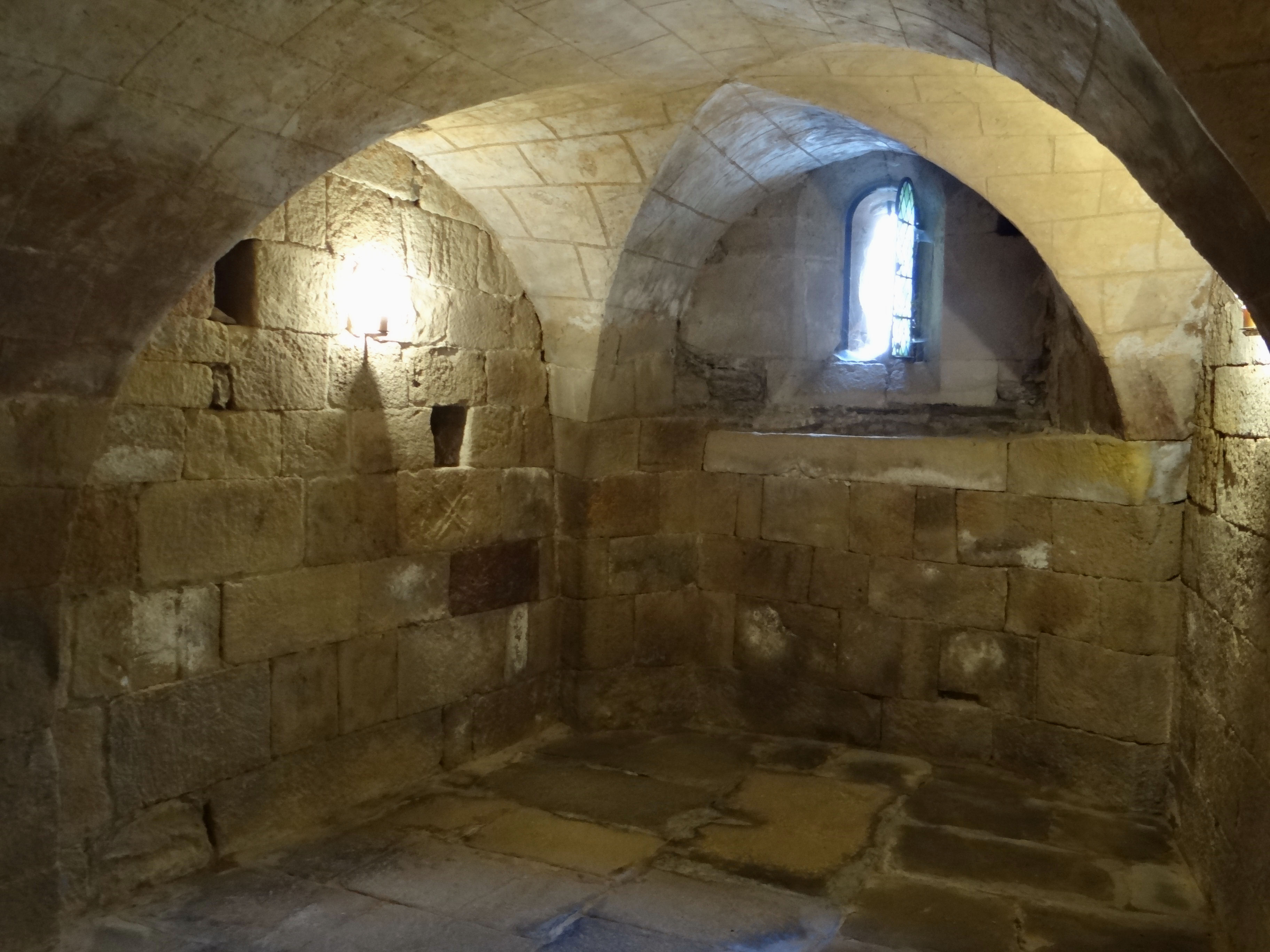 Castelnau-Pégayrols - Église Saint-Michel - La crypte sous le choeur